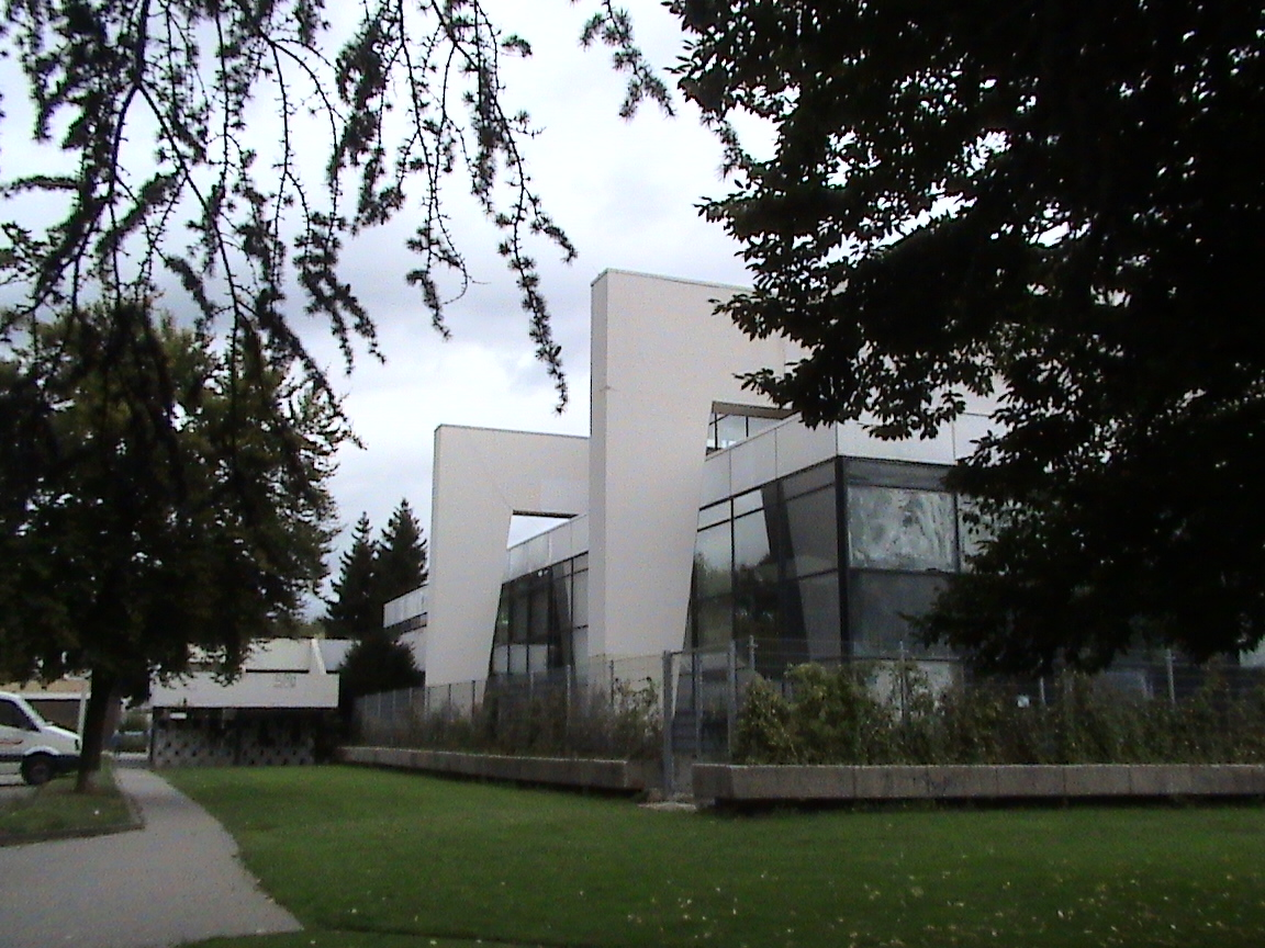 Das Pahlkebad von der Parkplatz Seite, zu sehen die unter Denkmalschutz gestellte Dachkonstruktion